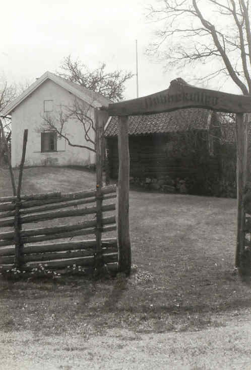 Nubbekullen i Västra Ny socken, våren 1992. Födelsehem för August Malmström. En bild tagen av Harri Blomberg.